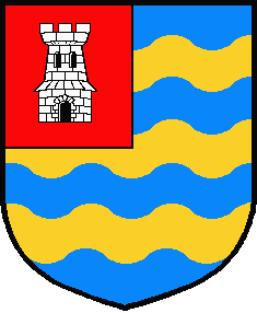 Blason de la ville de Trégastel - France (22)